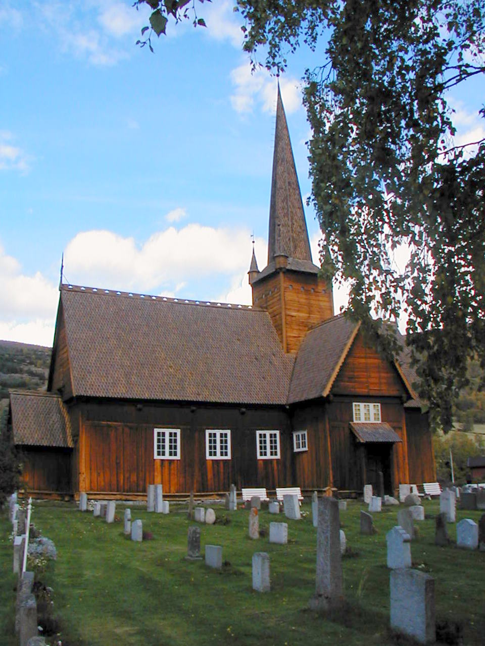 no: Vågå kyrkje en: Vågå church